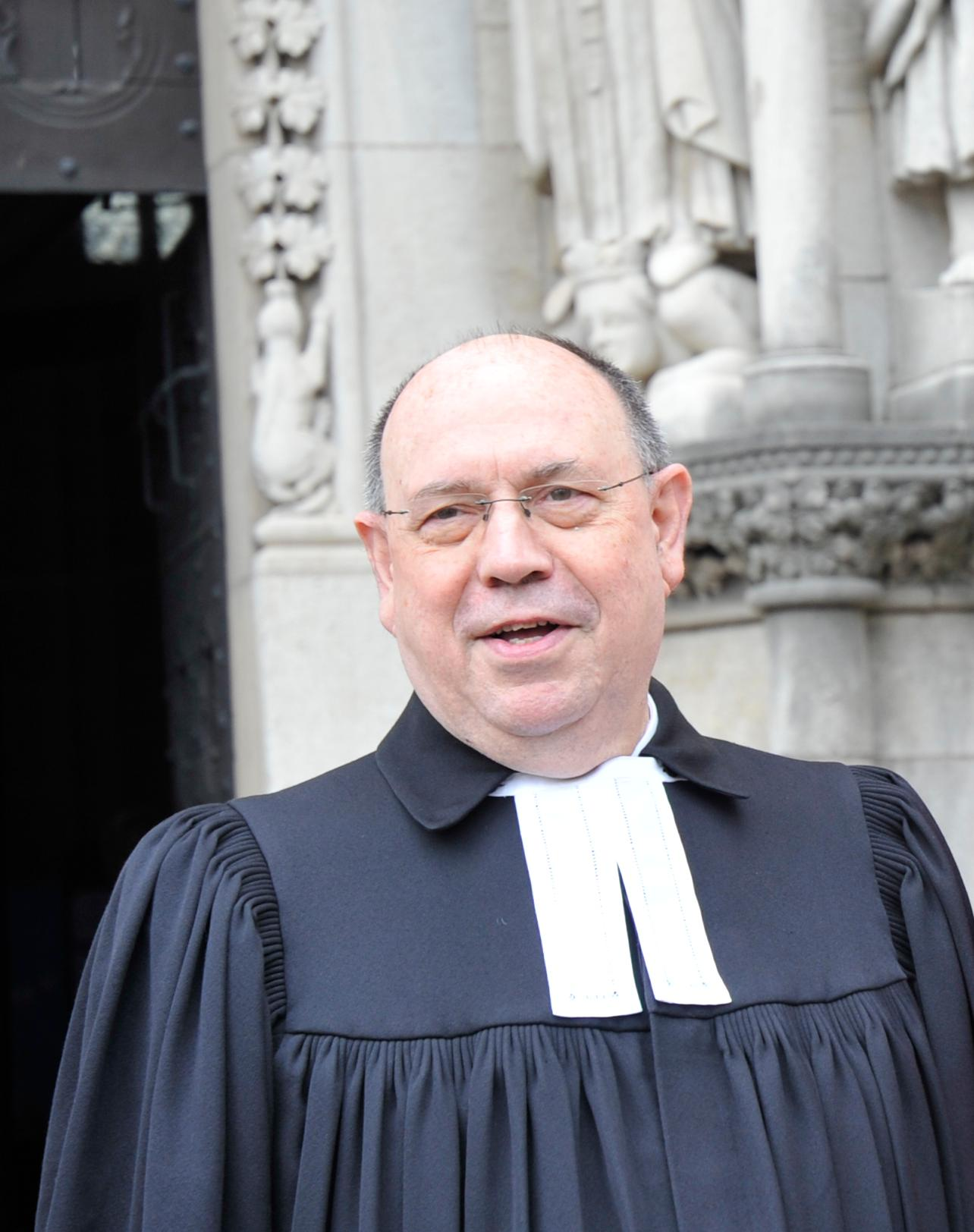 Der Ratsvorsitzende der Evangelischen Kirche in Deutschland (EkD), Nikolaus Schneider am 1. Juni 2012 beim Ökumenischen Gottesdienst beim Hessentag im Dom von Wetzlar